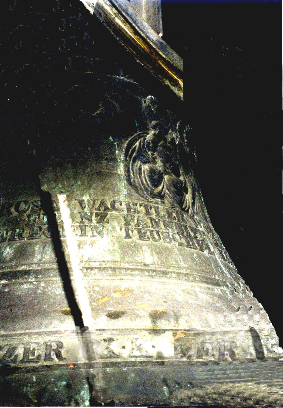 Dreifaltigkeits-Glocke zu Kaisersteinbruch